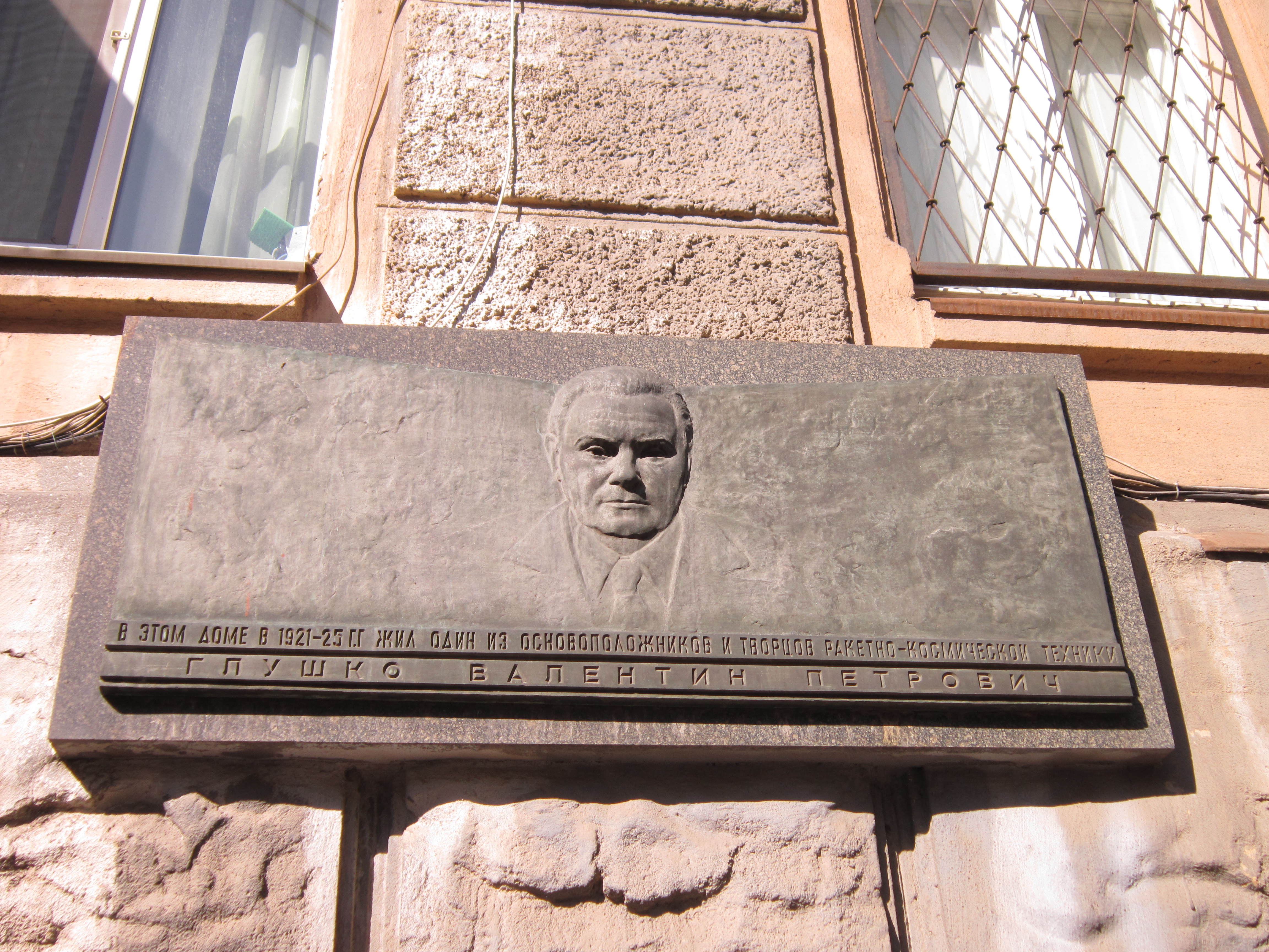 Будинок прибутковий,у якому жив В.П. Глушко - засновник вітчизняного ракетобудування, двічі Герой Соціалістичної праці, Одеса, Ольгіївська вул., 10